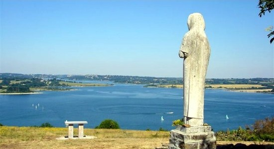 La Vierge des Lacs - Salles-Curan (Aveyron)